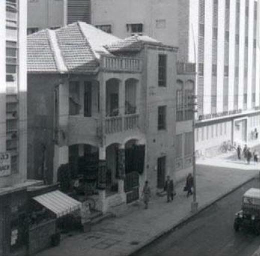 בית משפחת he:ראובן סגל